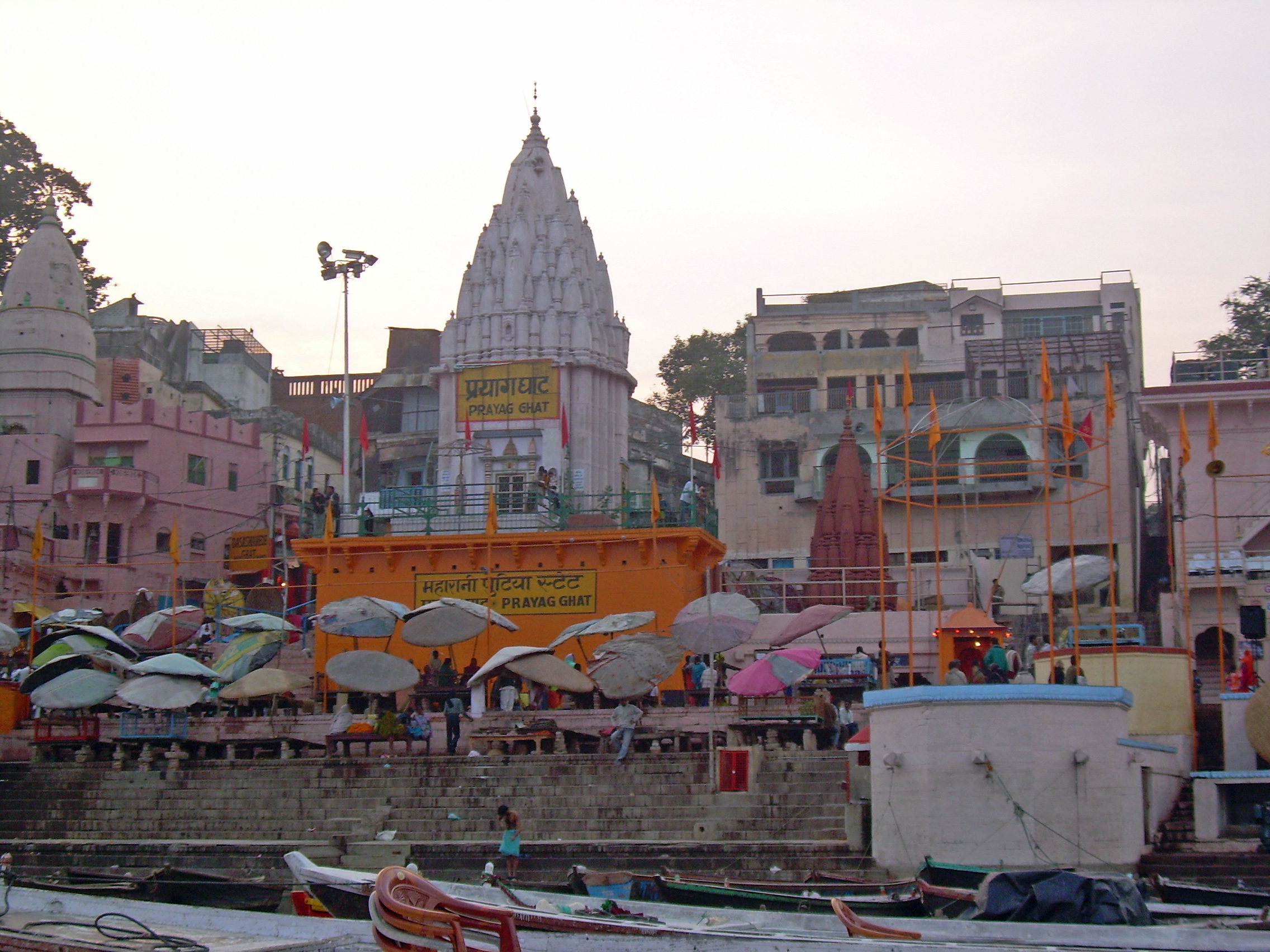 Praying Ghat.